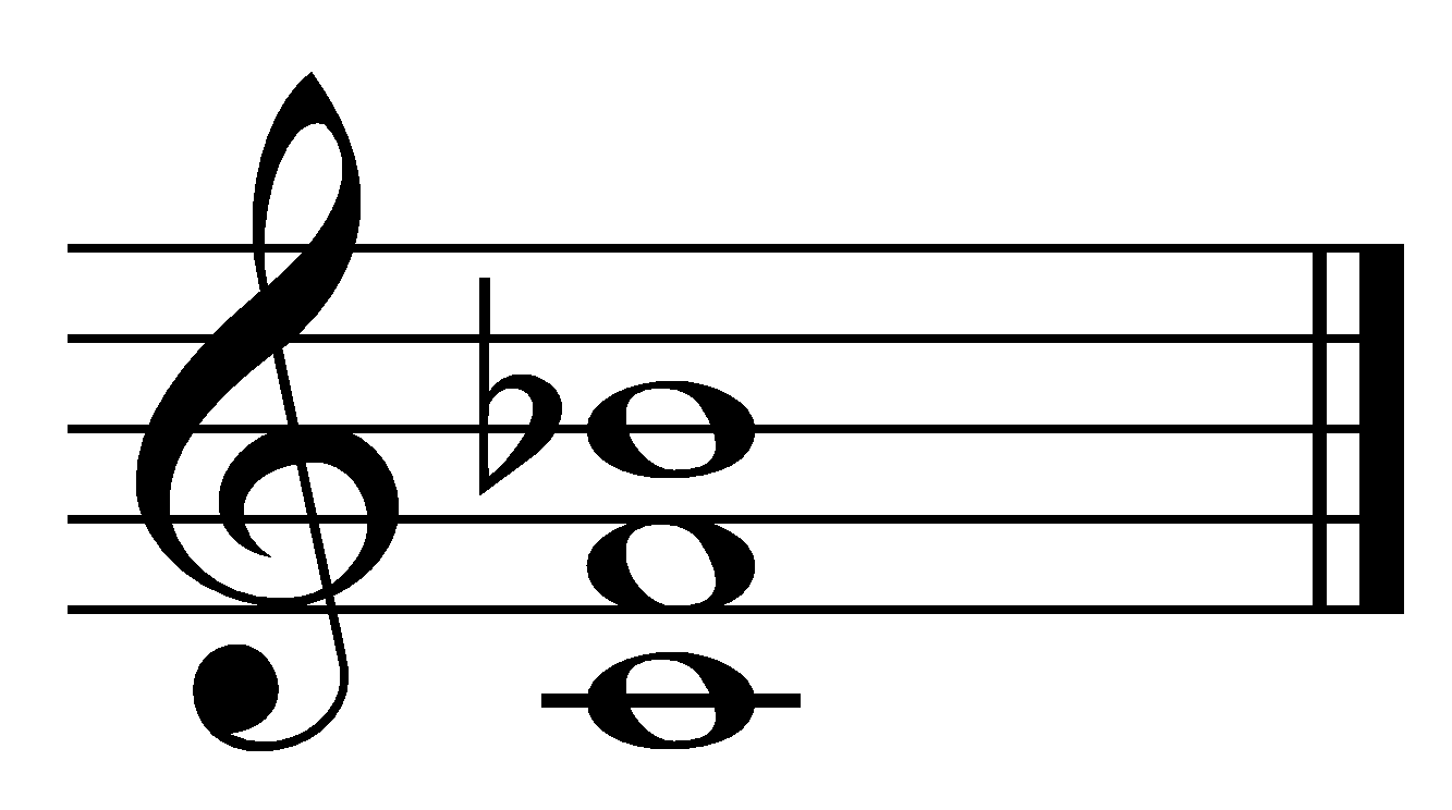 آکورد کوارتال روی نت دو